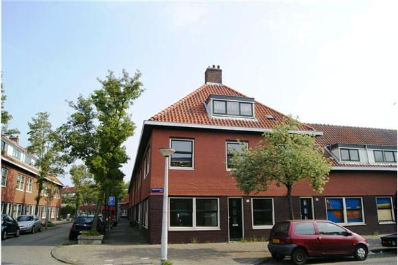 Azaleastraat, Bloemenbuurt, Amsterdam-noord, arbeiderswoningen gebouwd tussen 1925 en 1930 door woningbouwvereniging Zomers Buiten